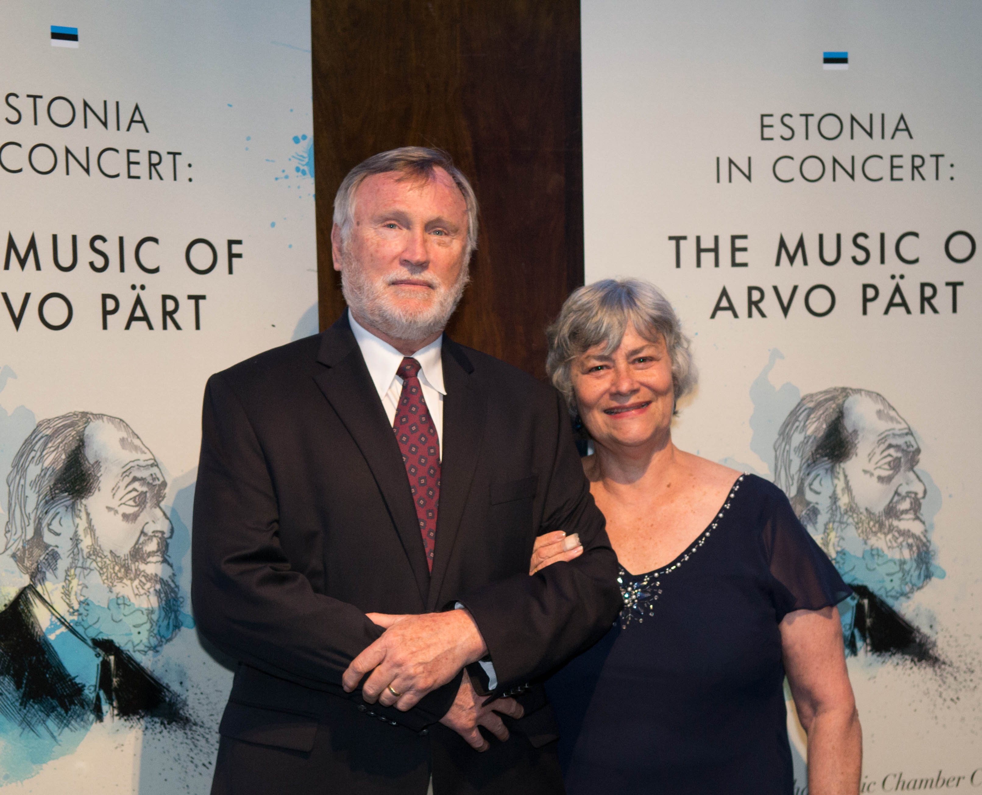 Priit Vesilind abikaasaga